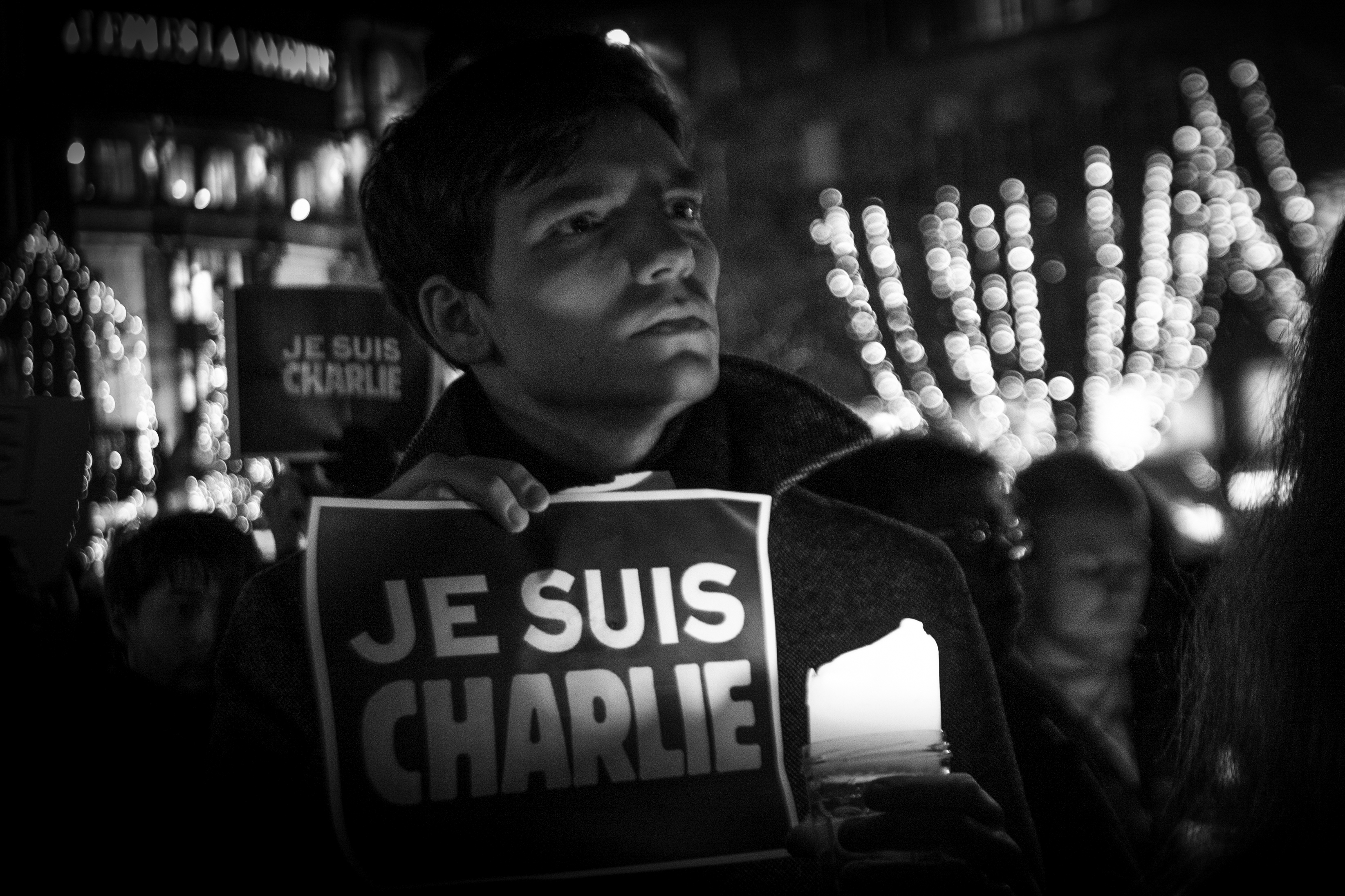 Je suis Charlie Strasbourg 7 janvier 2015